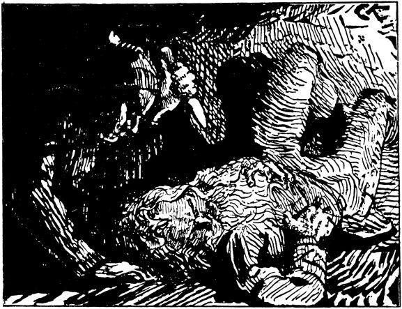 Christian Krogh: Illustration for Olav Tryggvasons saga, Heimskringla 1899-edition. nn: «Kark myrdar Håkon jarl.» nb: «Kark myrder Håkon jarl.»